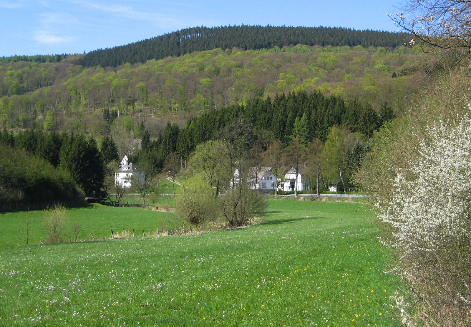 Verlauf des Gierskoppbachs im Wiesental am Schmittekamp in Elleringhausen, Olsberg, Deutschland. Blick nach Norden.